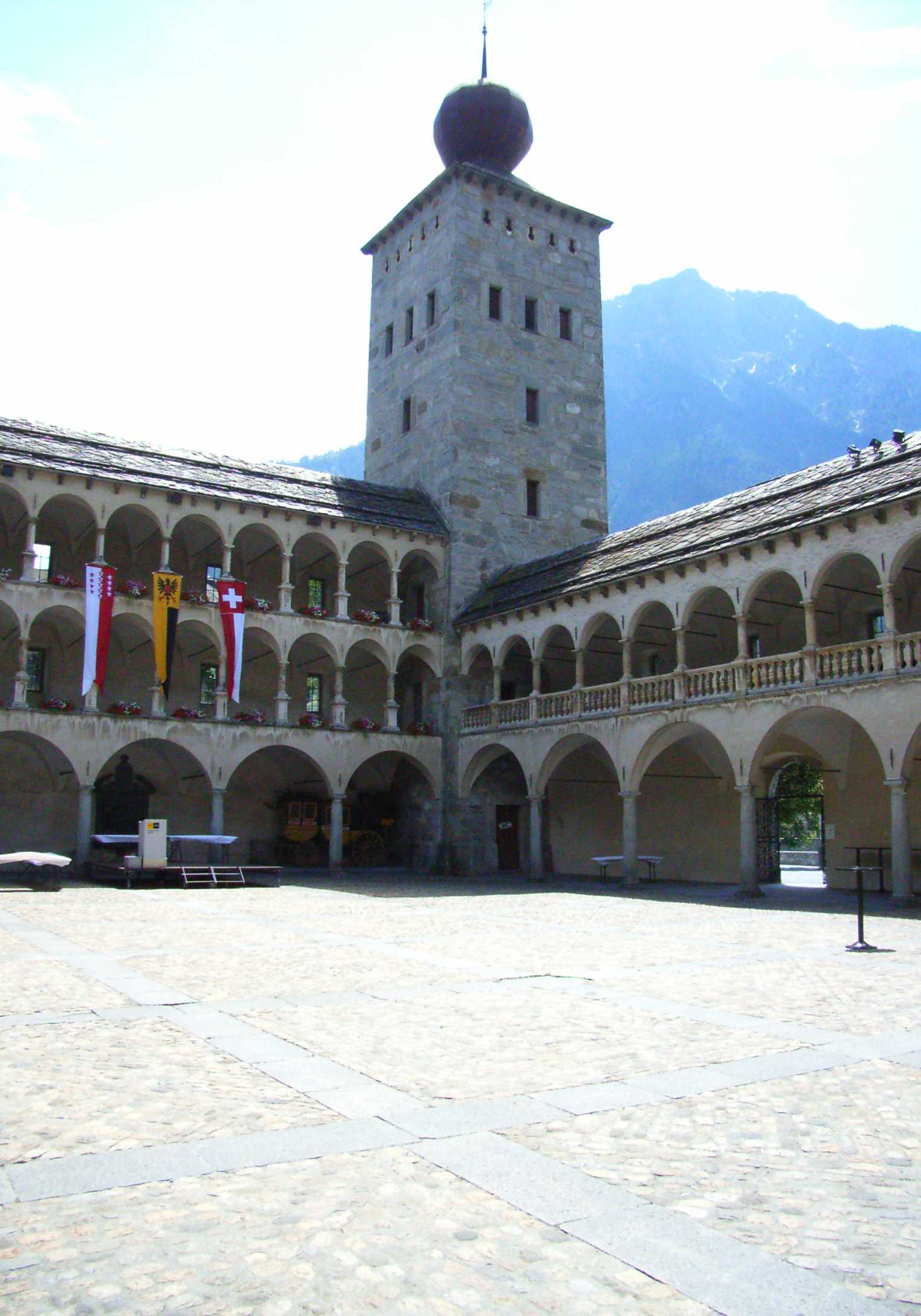 Brig, Innenhof des Stockalperpalastes